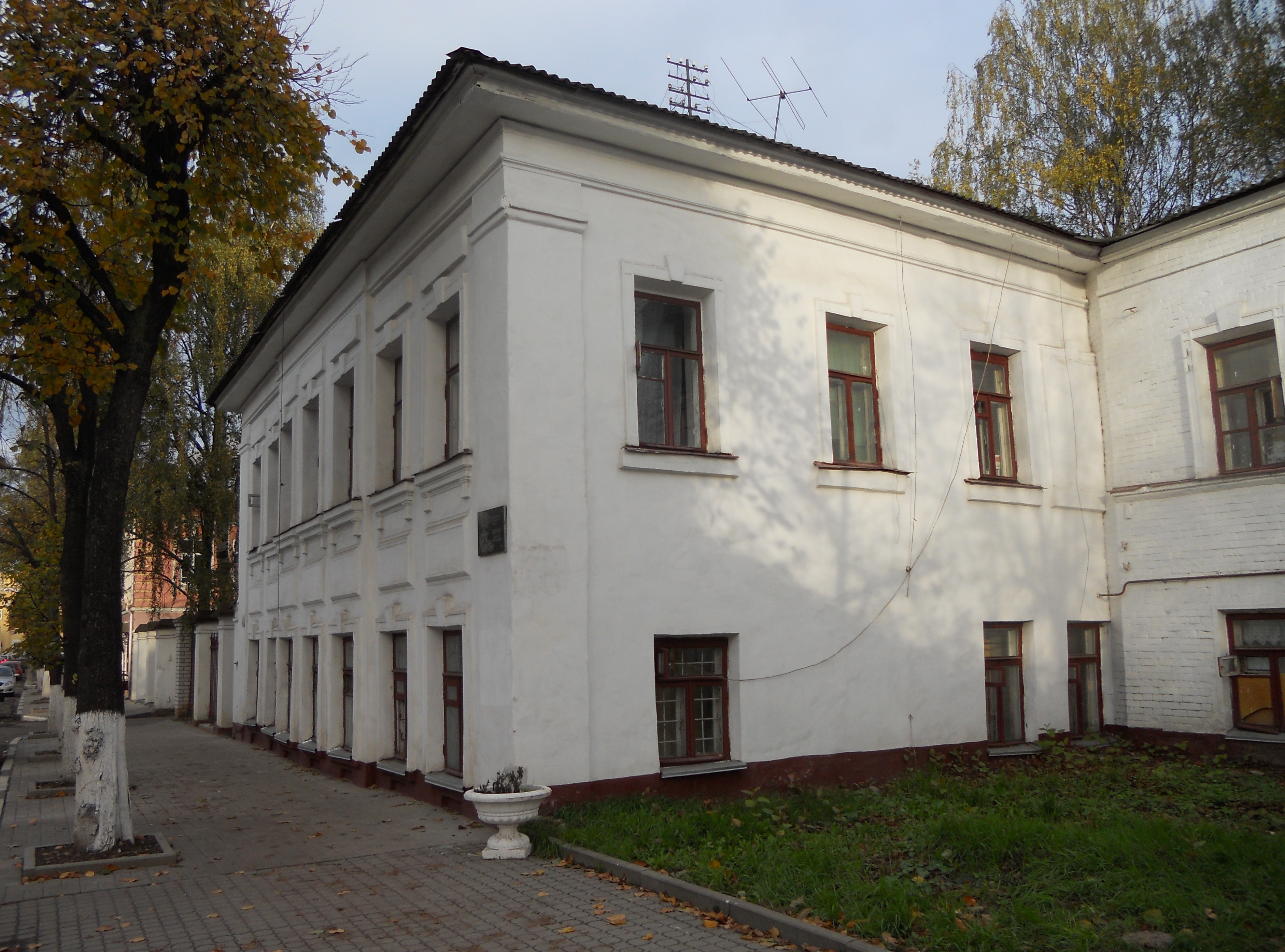 Ярославль, ул. Трефолева 13. В этом доме жил Герой Советского Союза Андреев Алексей